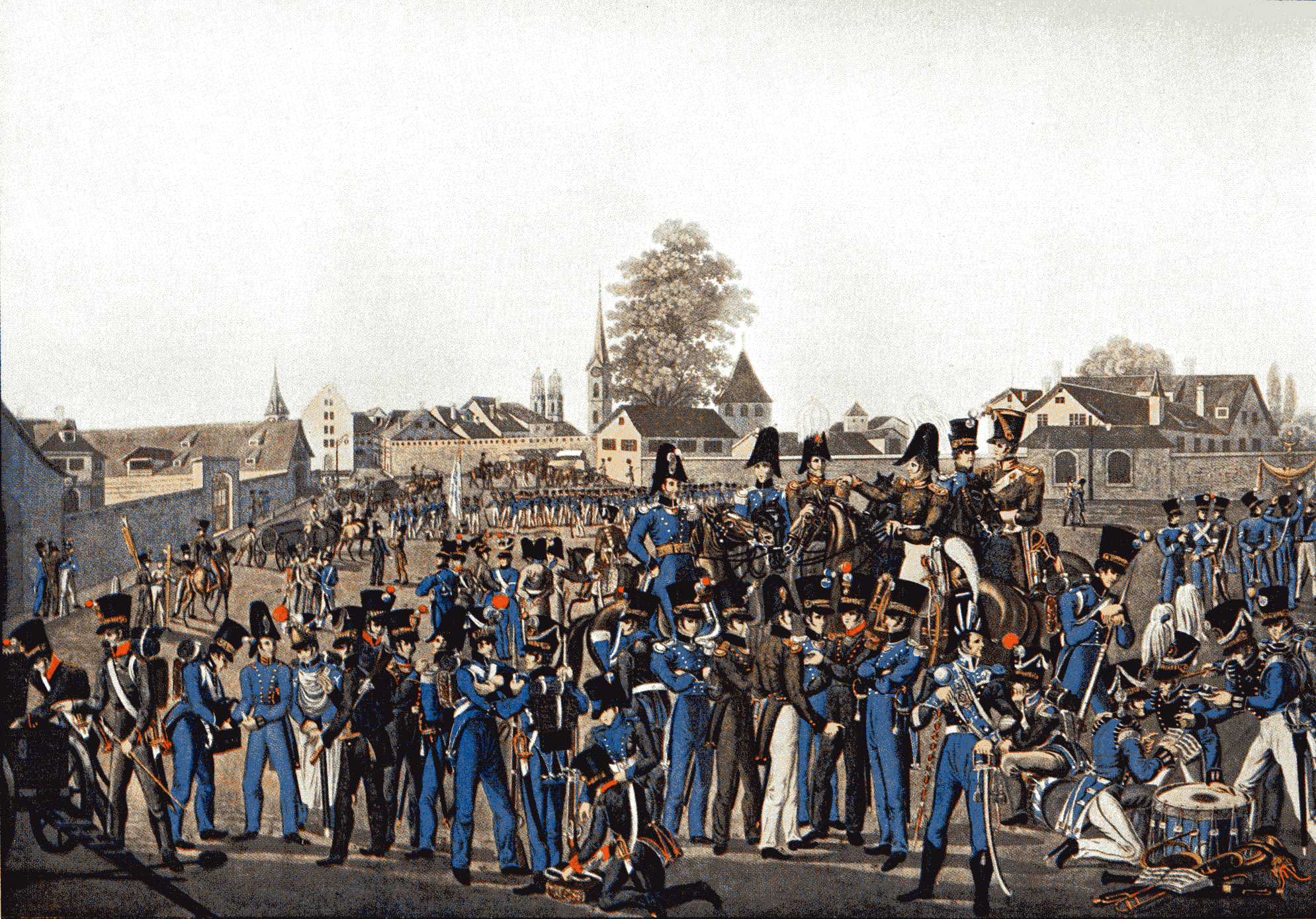 Uniformen der Truppen des Kantons Zürich um 1820. Schauplatz ist der heutige Paradeplatz in Zürich